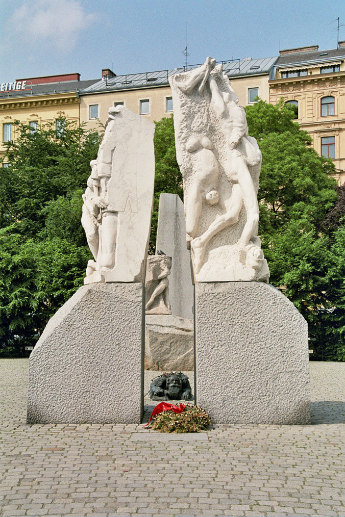 Mahnmal gegen Krieg und Faschismus - Monument against War and Fascism in Vienna, Austria